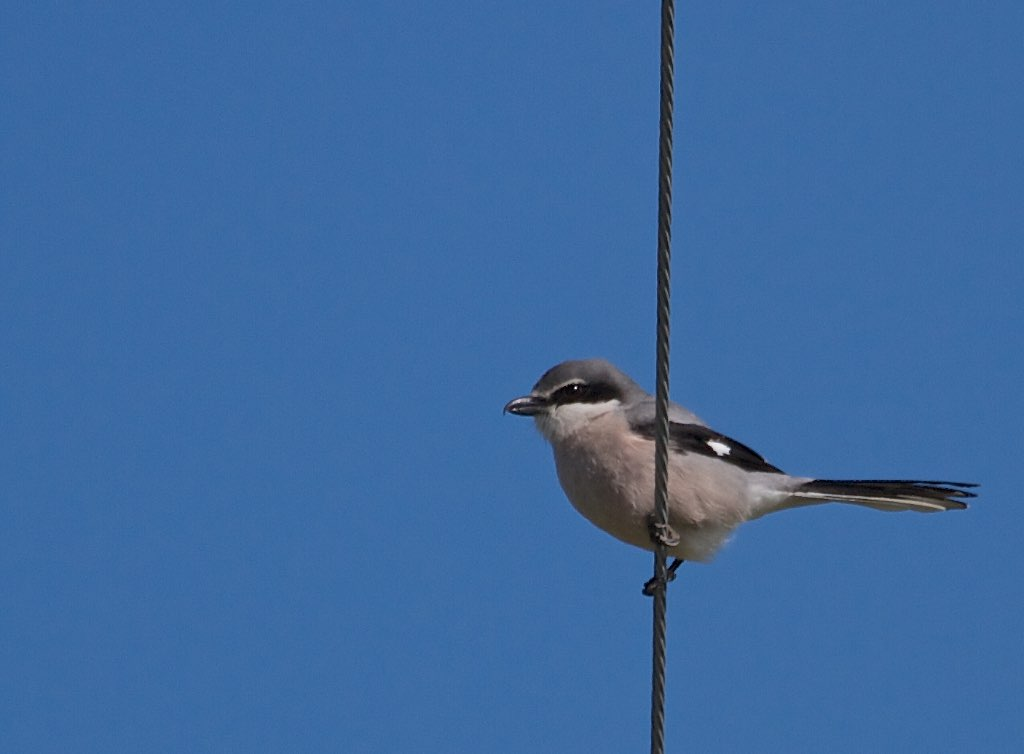 Lanius meridionalis, Pêra, Algarve, Portugal